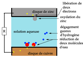 Schéma résumant le principe de fonctionnement de la pile Volta /